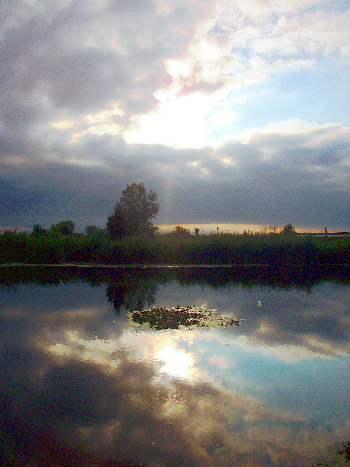 A Kos-tök holtág Fülöpszállás határában.